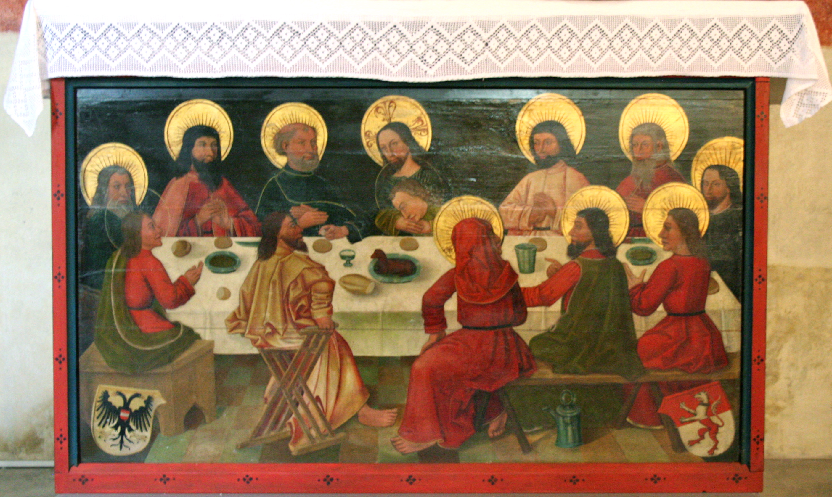 Kirche St. Maria und Michael in Churwalden, Predella des Hochaltars